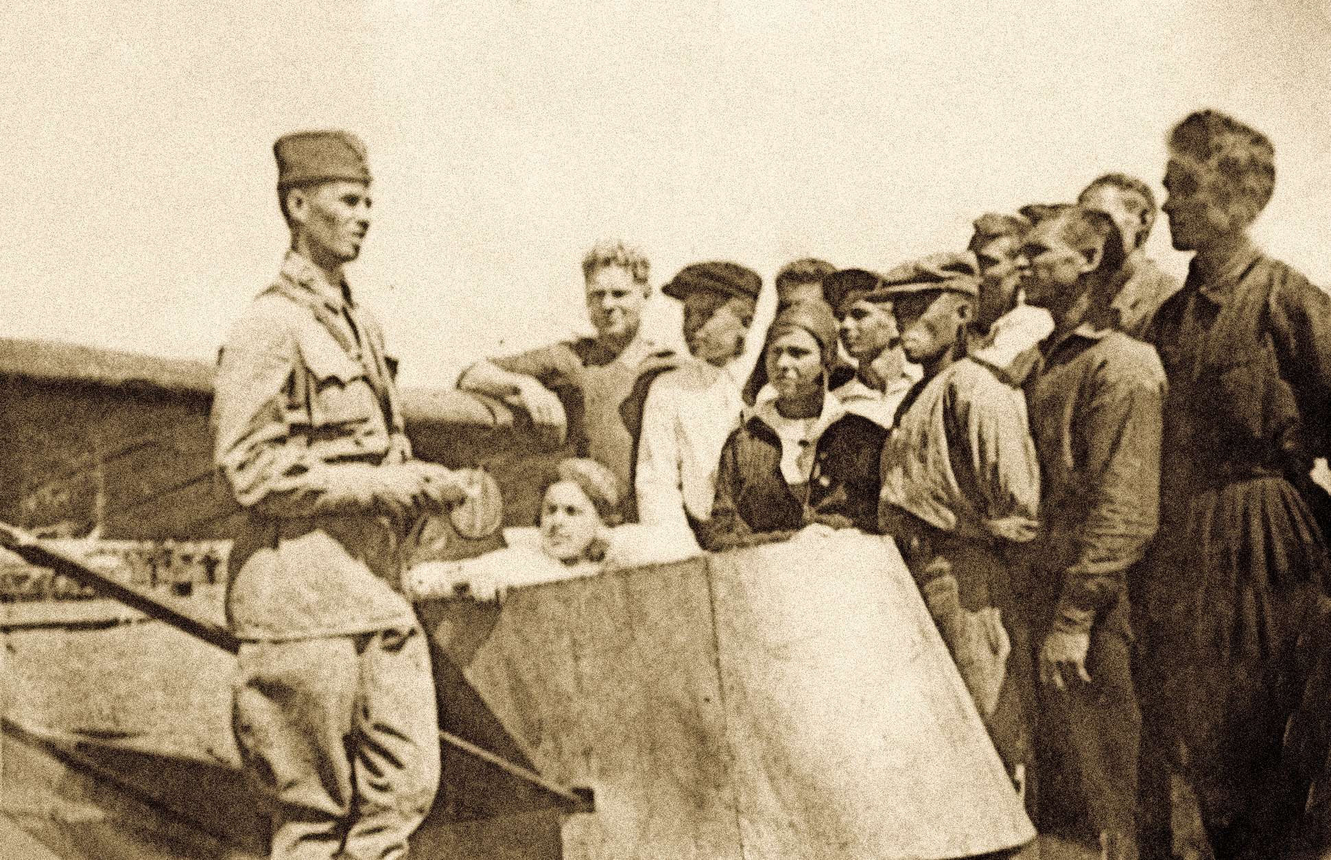 планерный кружок Template:An Antonov A-1 primary training glider with students